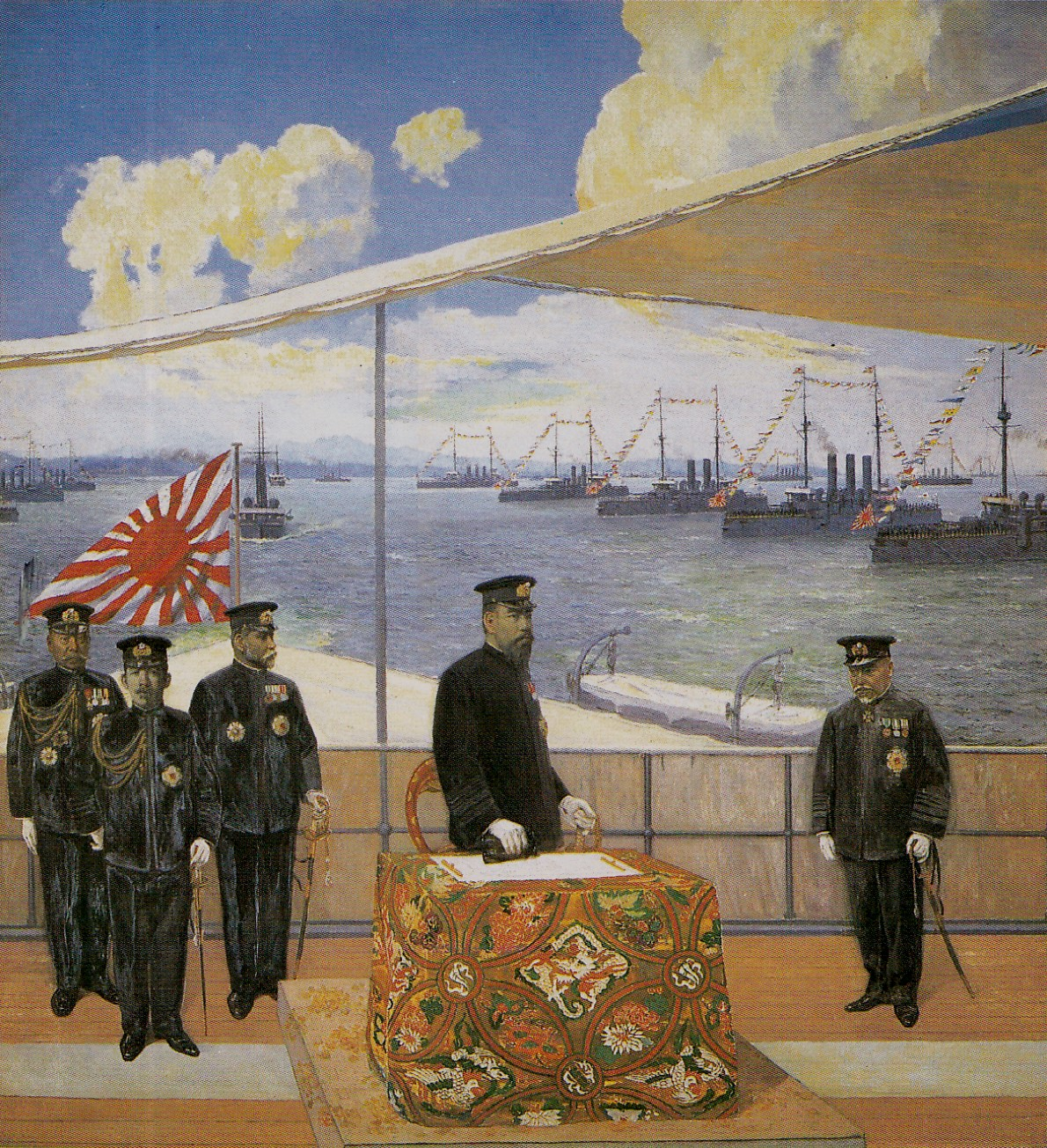 「凱旋観艦式」1905年（明治38年）10月23日 横浜港ニテ御召艦浅間、海軍省奉納